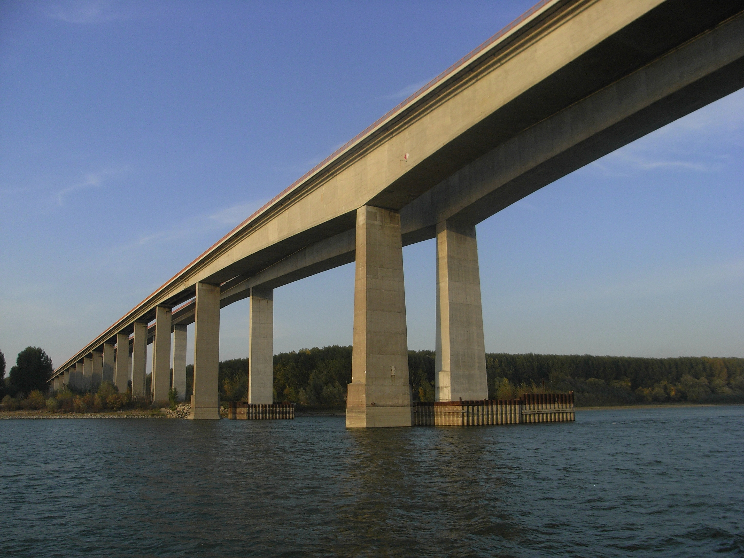 Srpski (latinica): Beška Most